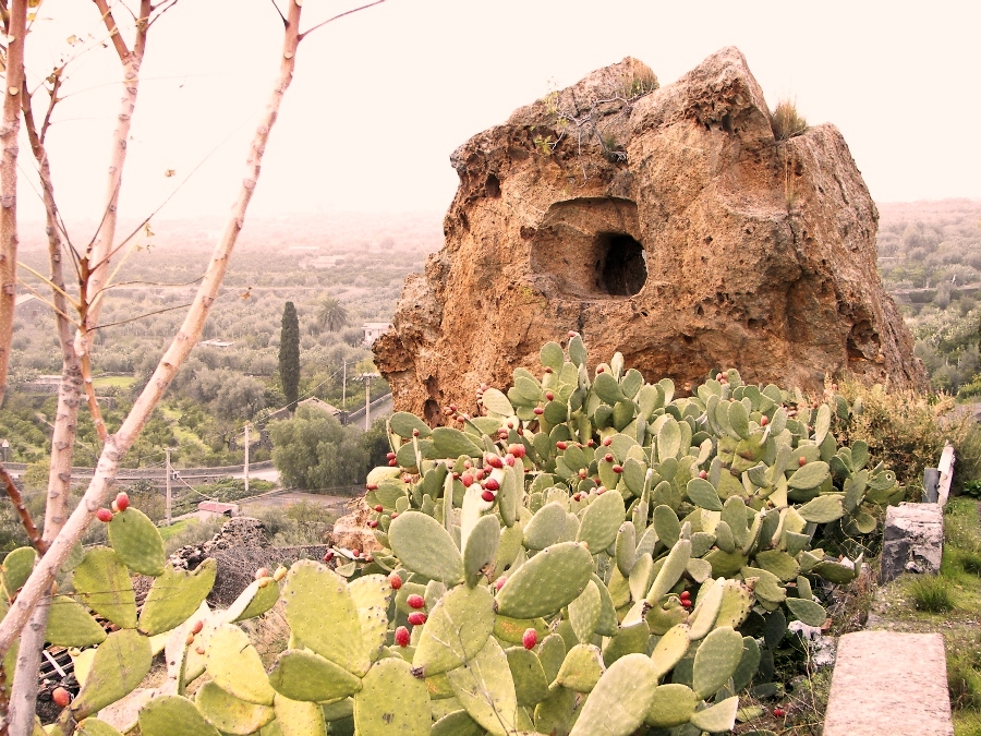 Petra Pirciata, Santa Maria di Licodia